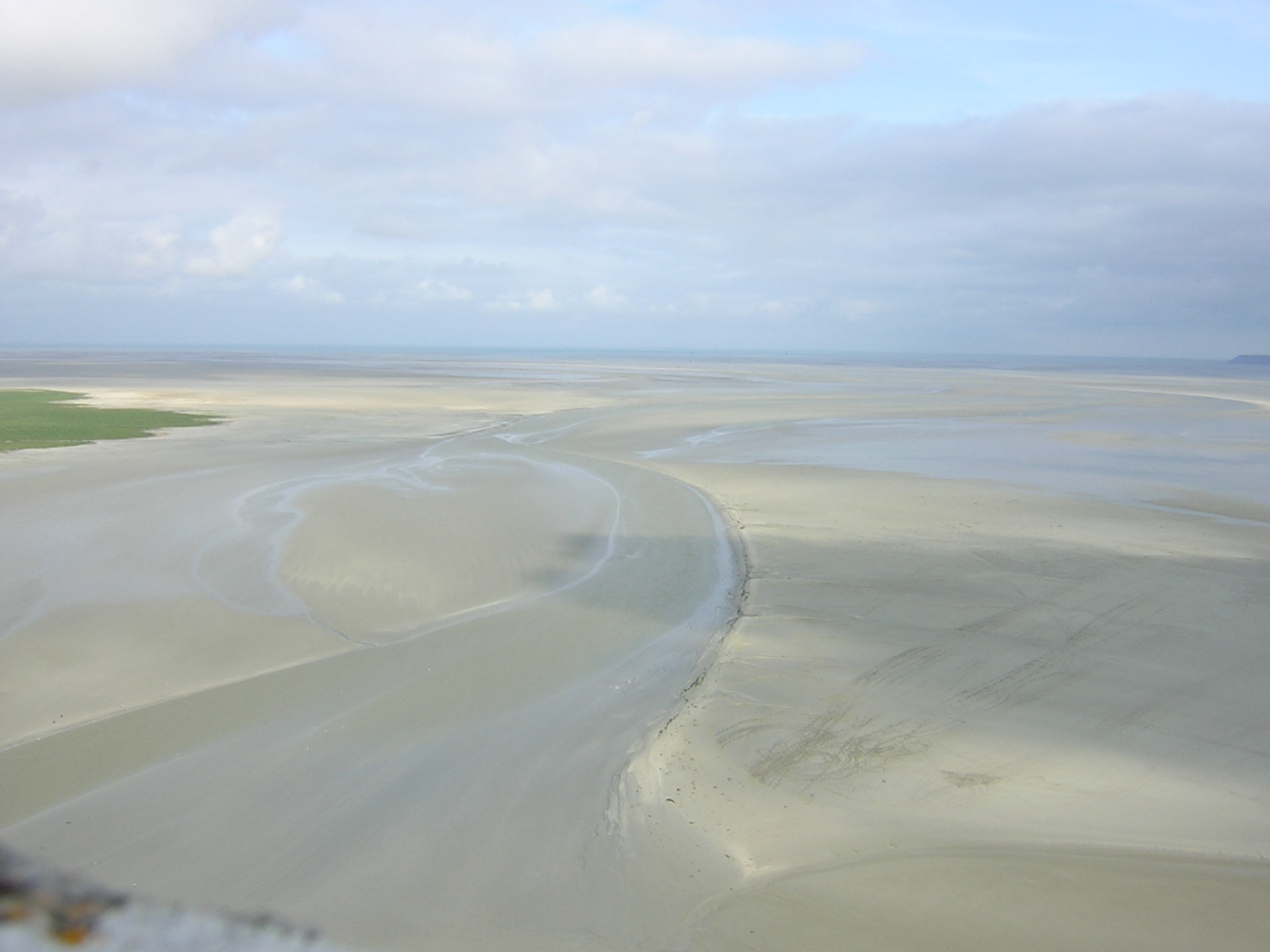 Marea baja desde el Mont Saint Michel